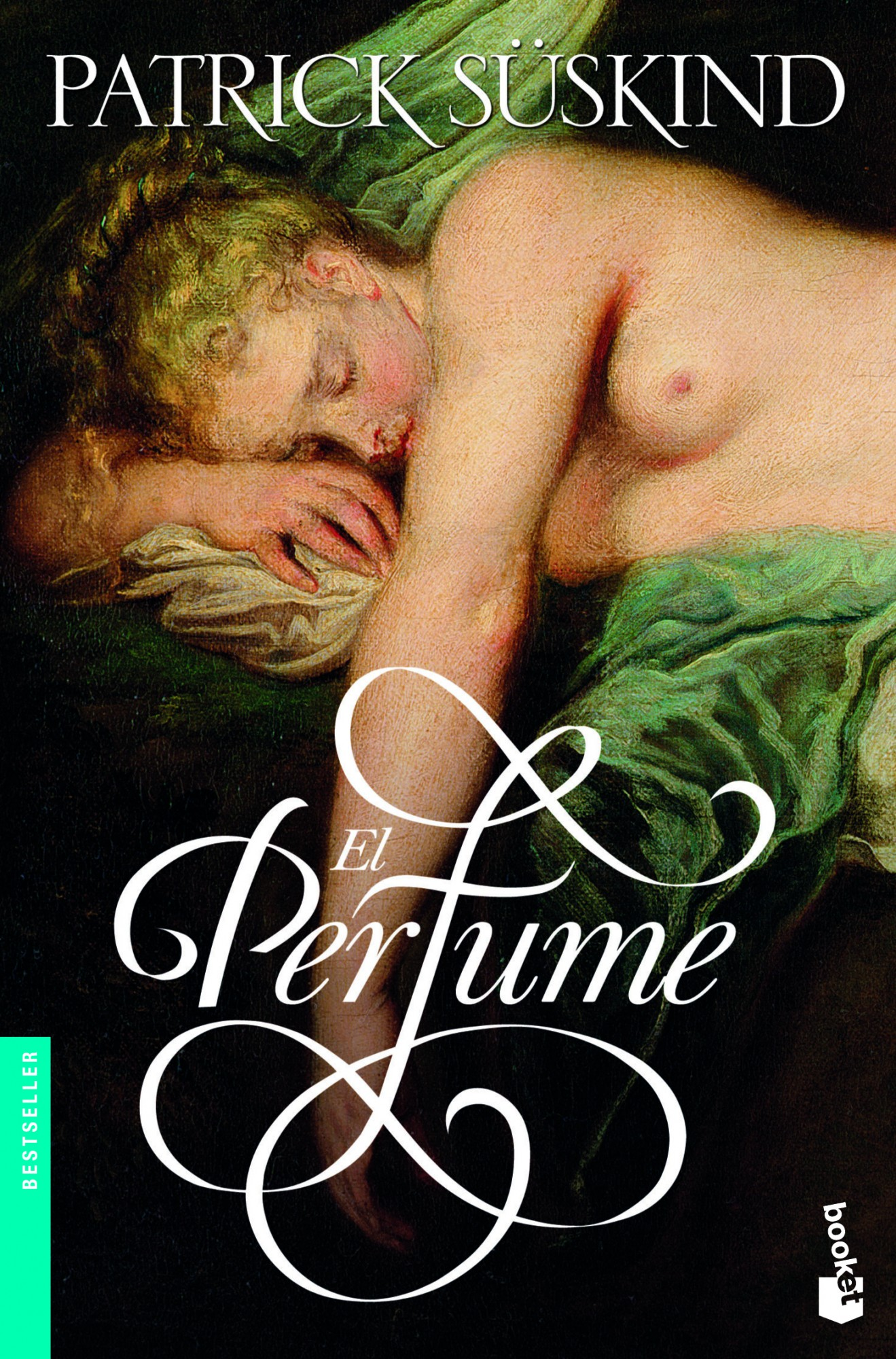 Uno de los grandes fenómenos editoriales a escala mundial llevado al cine.